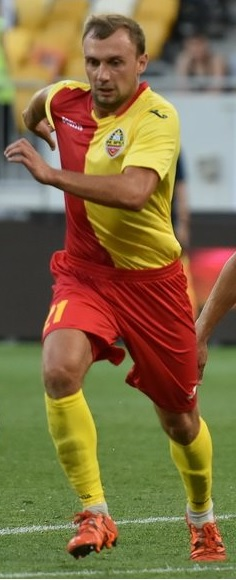 Игорь Загальский - украинский футболист